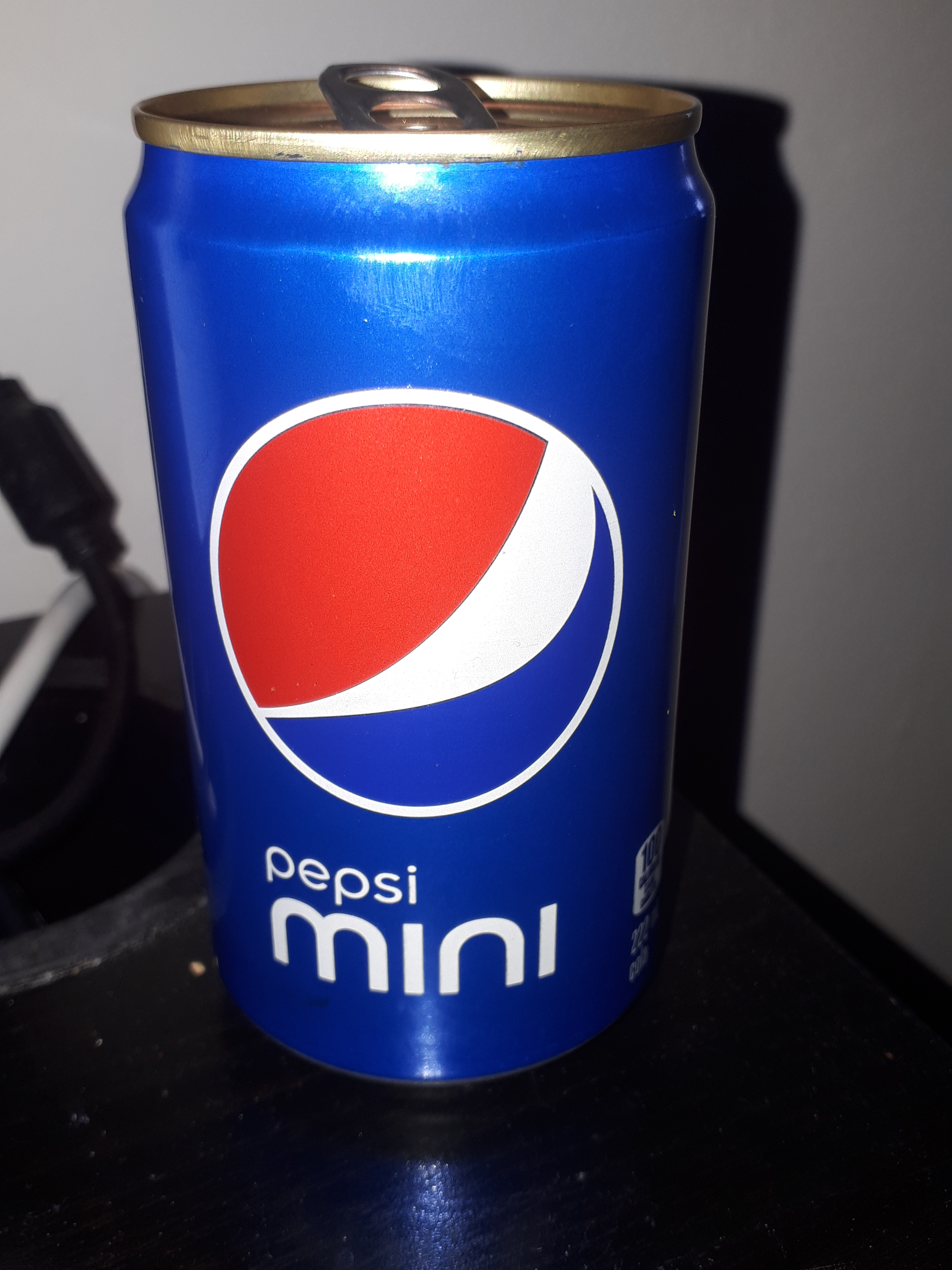 cannette de soda, marque pepsi, format 222mL